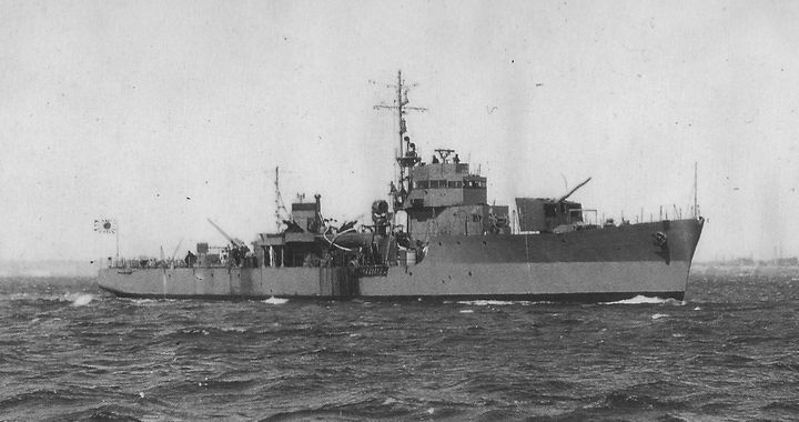 日本海軍第一号型海防艦『第五号海防艦』、東京湾、公試中